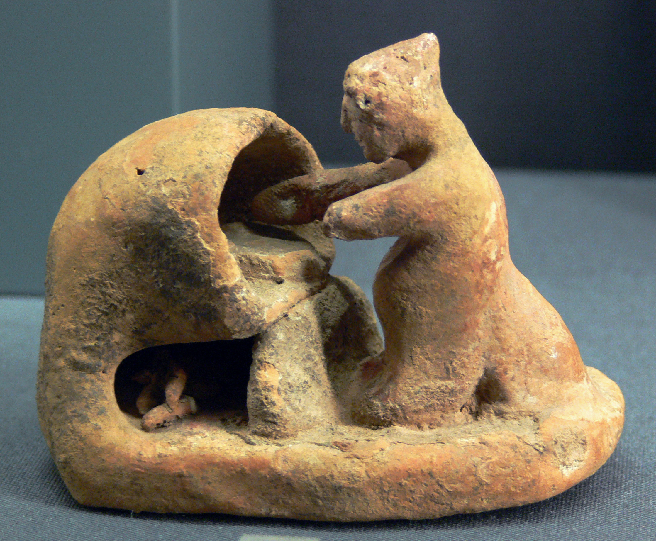 Wien, Kunsthistorisches Museum, Antikensammlung, Brotbäcker, böotisch, um 500 v. Chr., Inv. Nr. V 1814